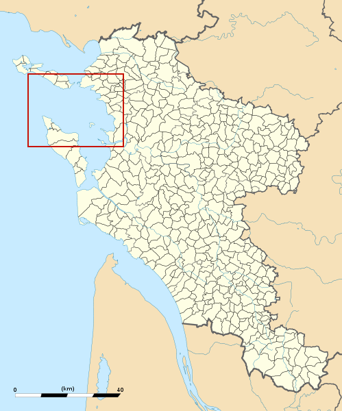 Pertuis d'Antioche en Charente-Maritime